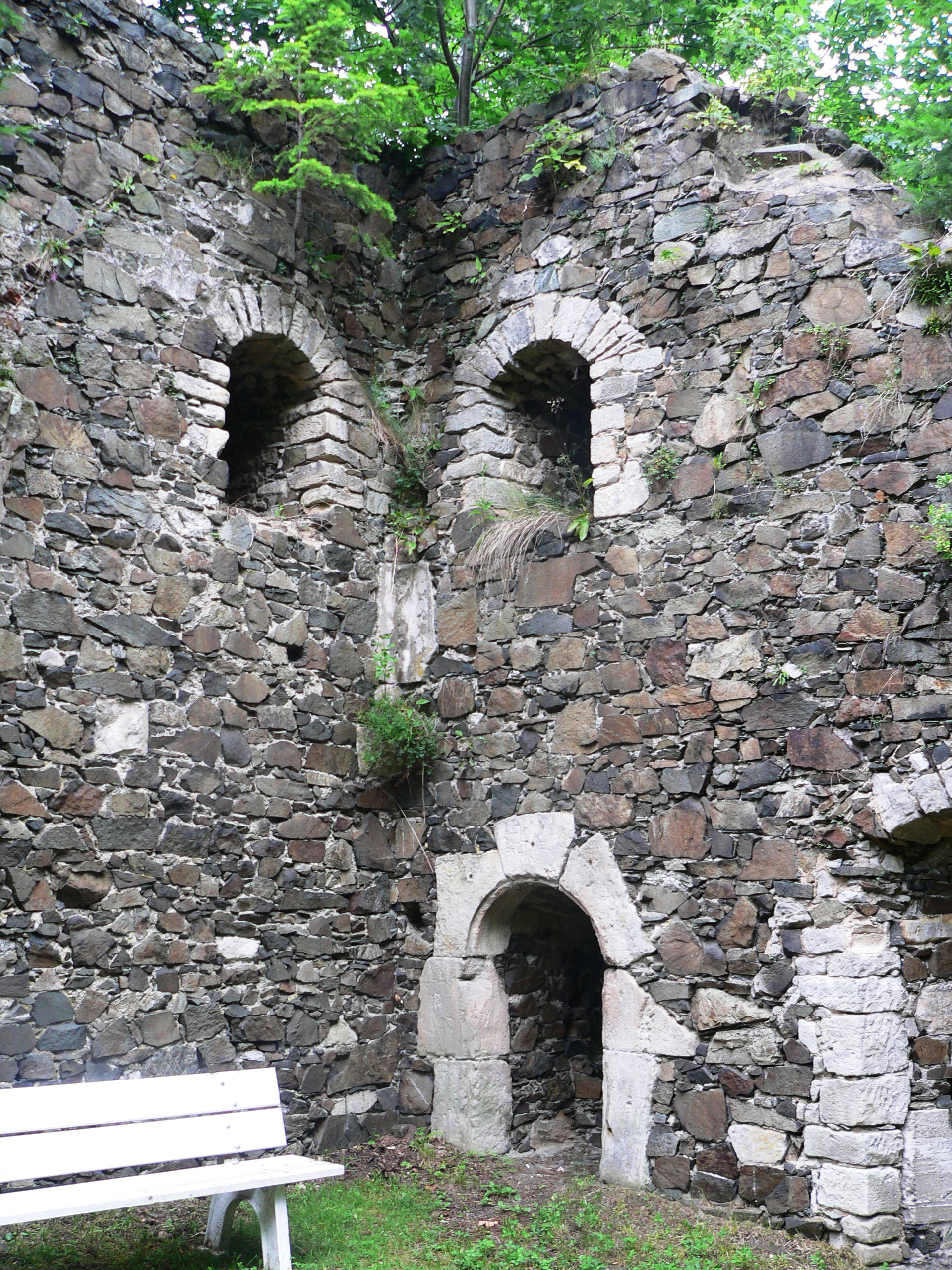 Ansicht der Ruine der Marienkapelle in Bad Berneck von Innen. Kragsteine für Empore und Ansätze des Kreuzgewölbes.